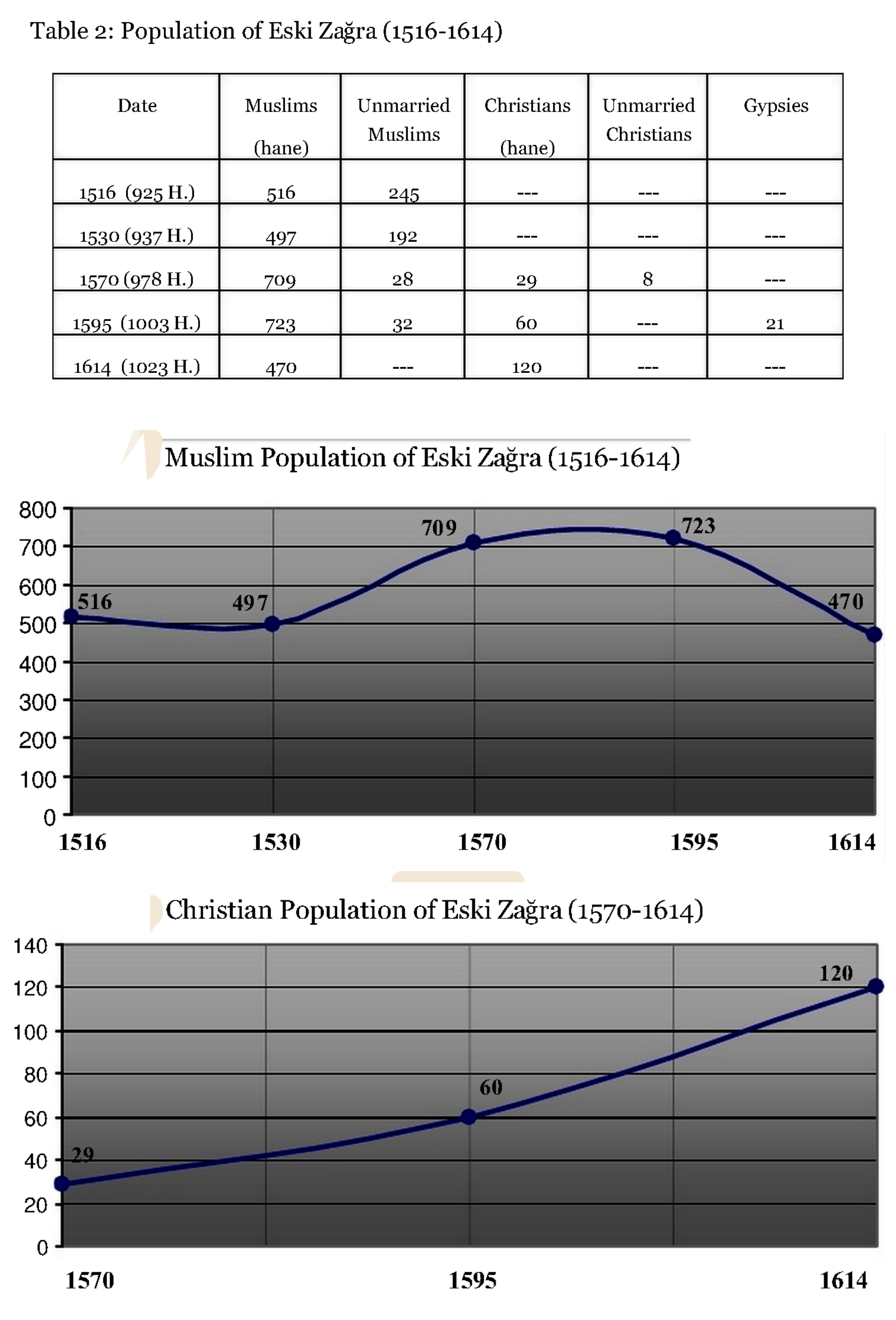 Taблици с населението на Стара Загора в периода 1516-1614 година